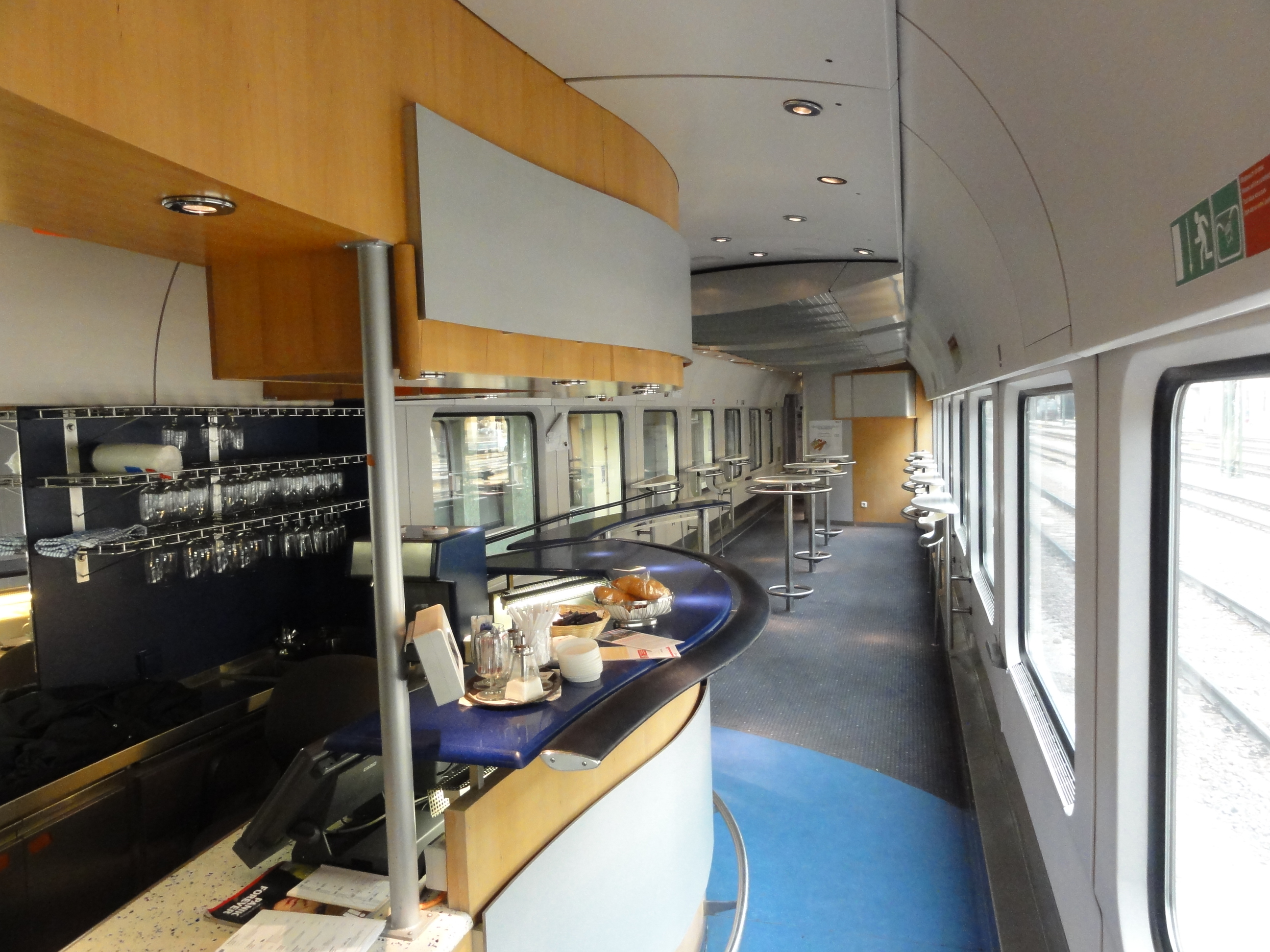 Speisewagen des DB-ÖBB EC 81 von München nach Verona Info EXIF data regarding date and time may be inaccurate.